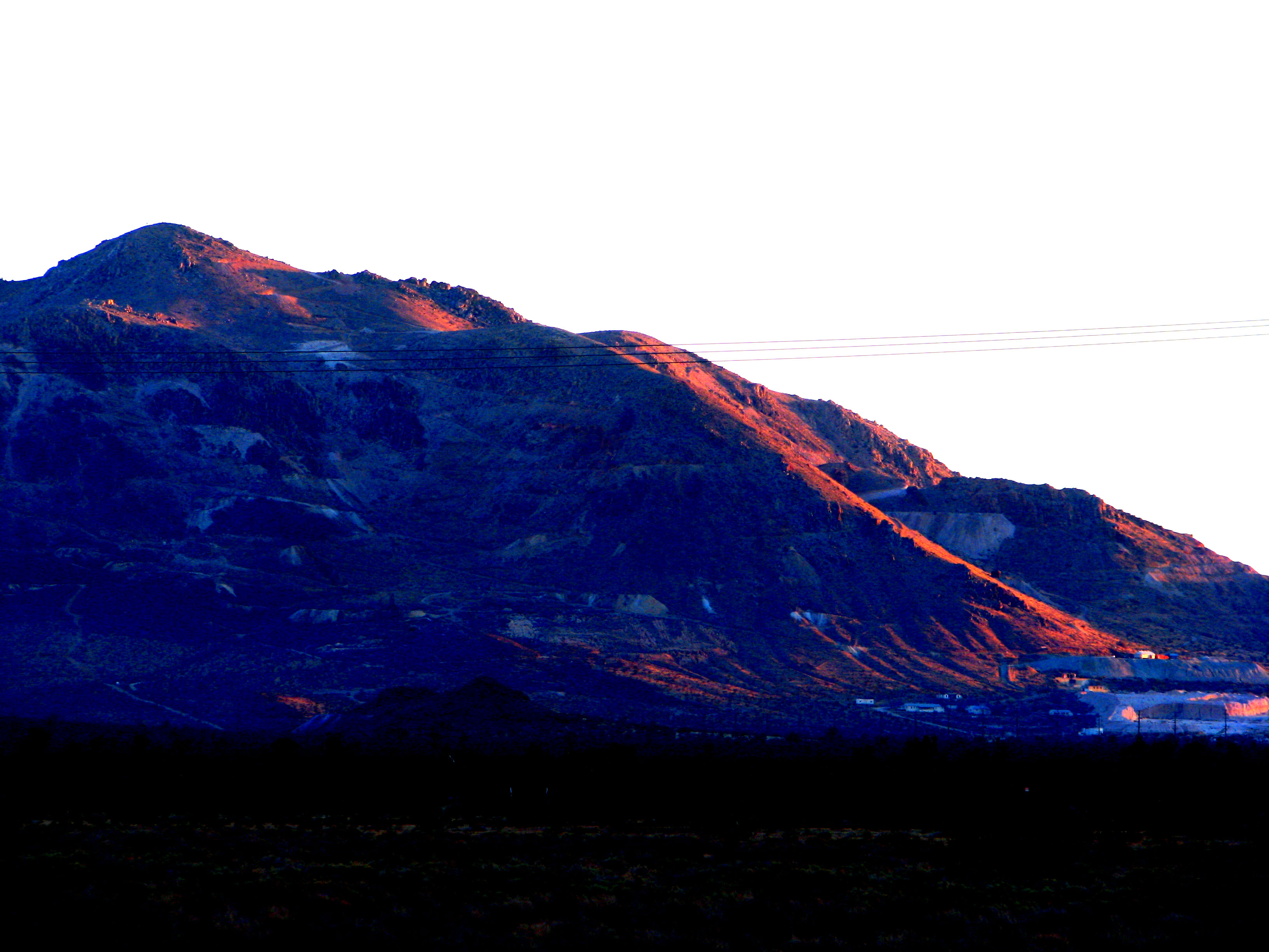 Mining hill.